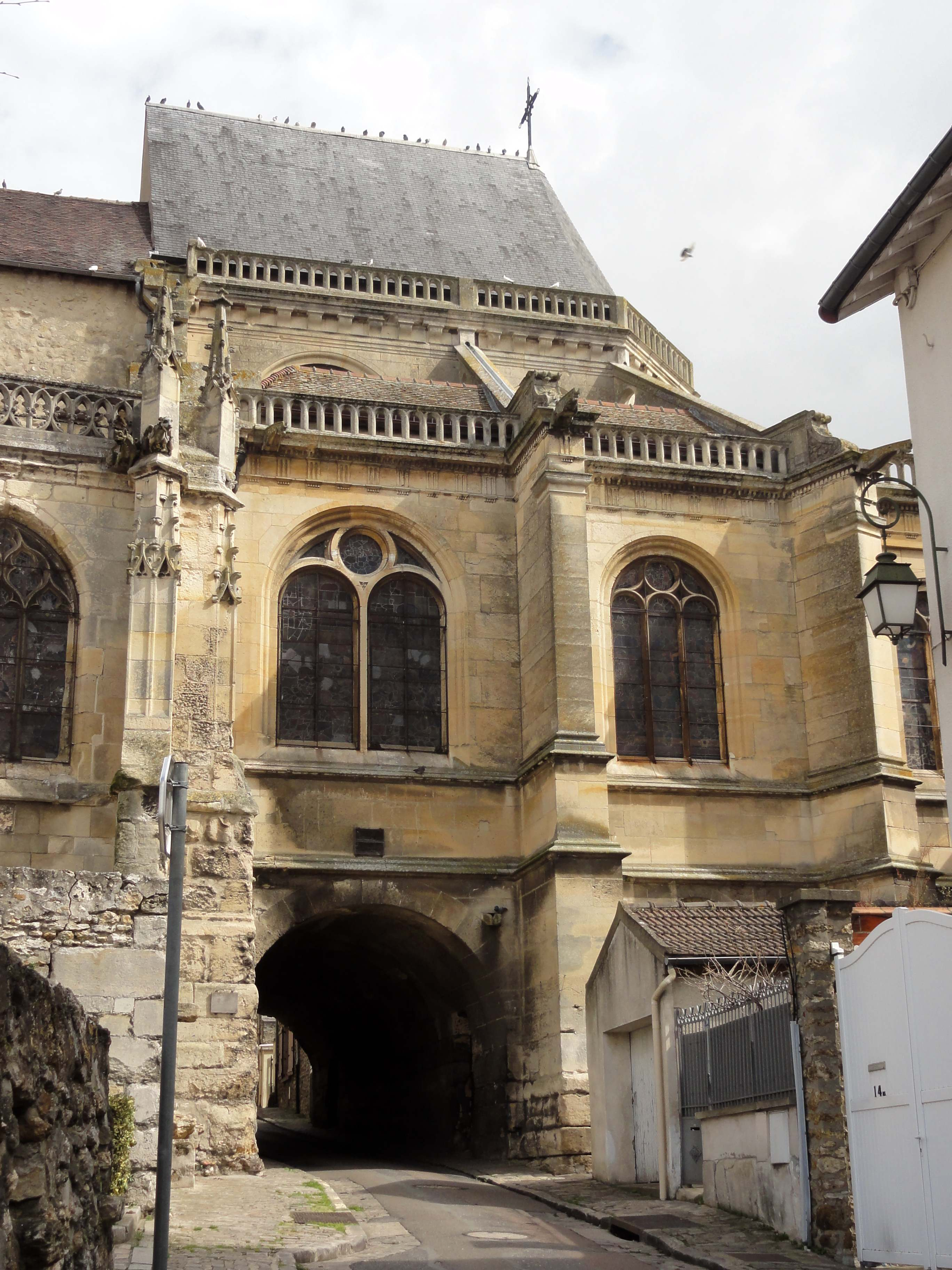 Église Saint-Martin - voir titre.